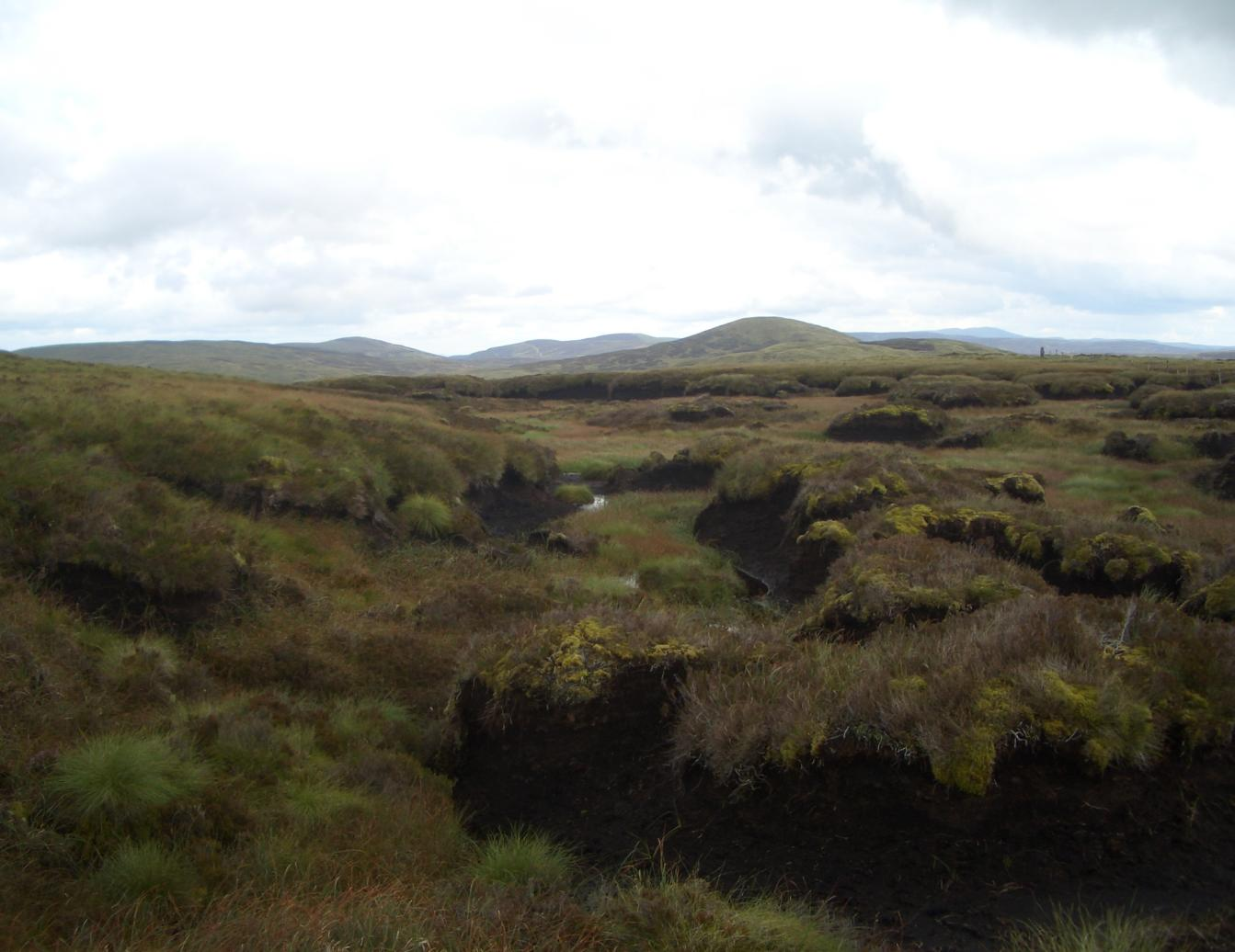 llechwedd du palteau